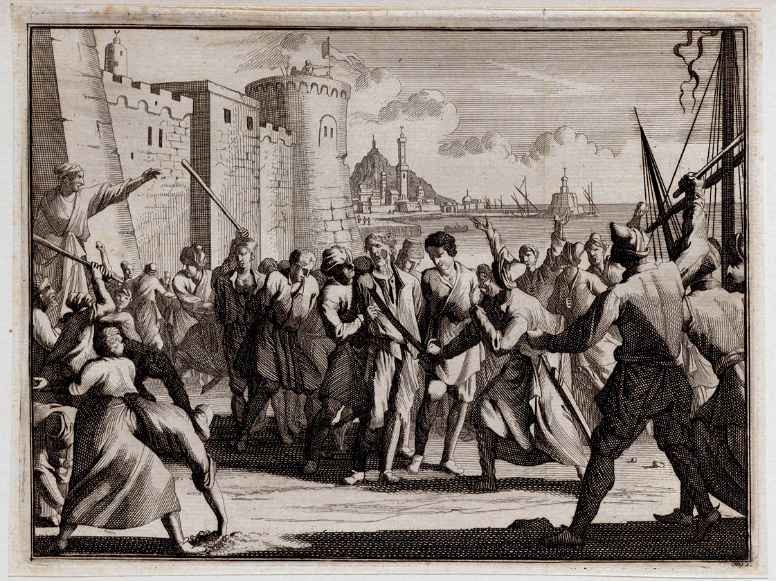 Gravure hollandaise ancienne. "Landing en mishandeling van gevangenen in Algiers". (lit. Débarquement et maltraitement de prisonniers à Alger)